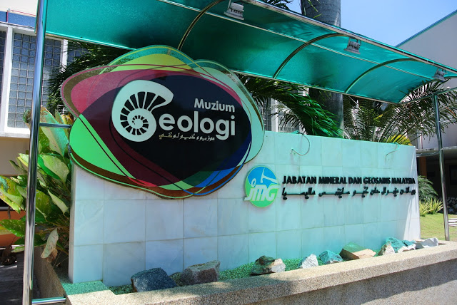 Muzium geologi jmg